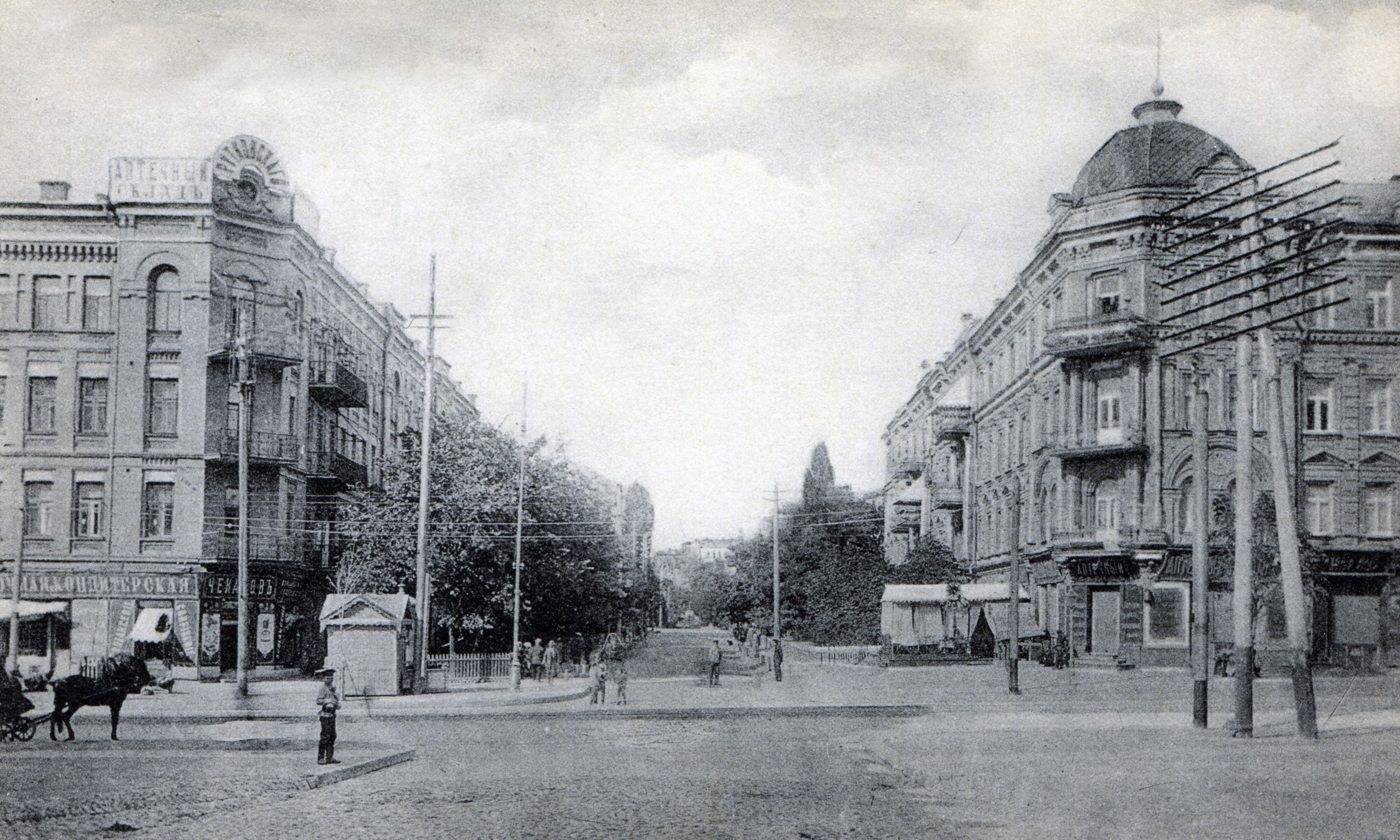 Жилий будинок, Київ, вул. Б. Хмельницького, 40/25